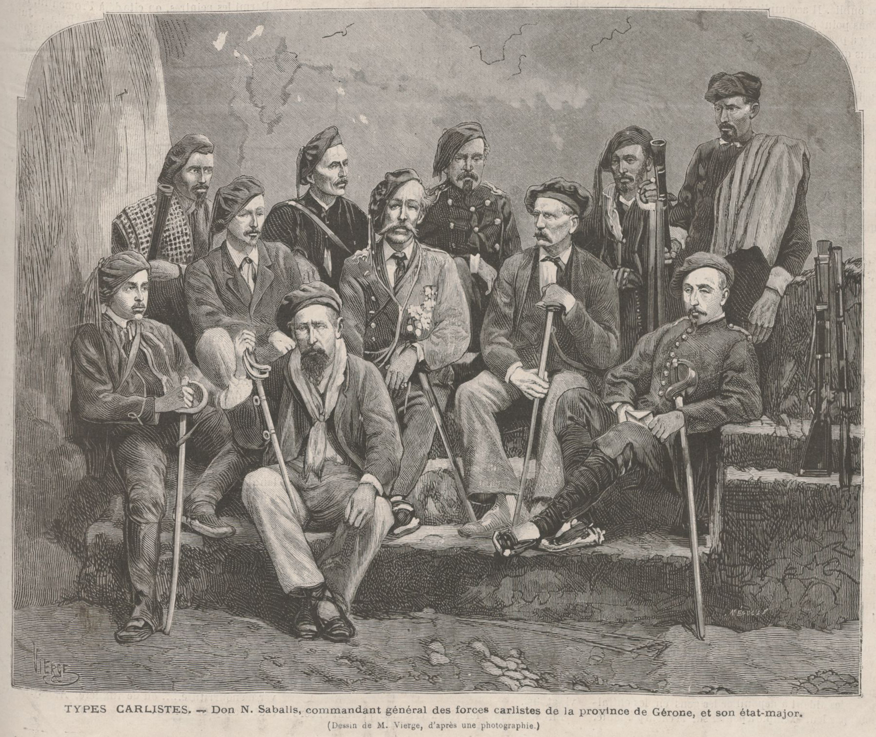 Types carlistes. — Don N. Saballs, commandant général des forces carlistes de la province de Gérone, et son état-major. (Dessin de M Vierge, d'après une photographie.)